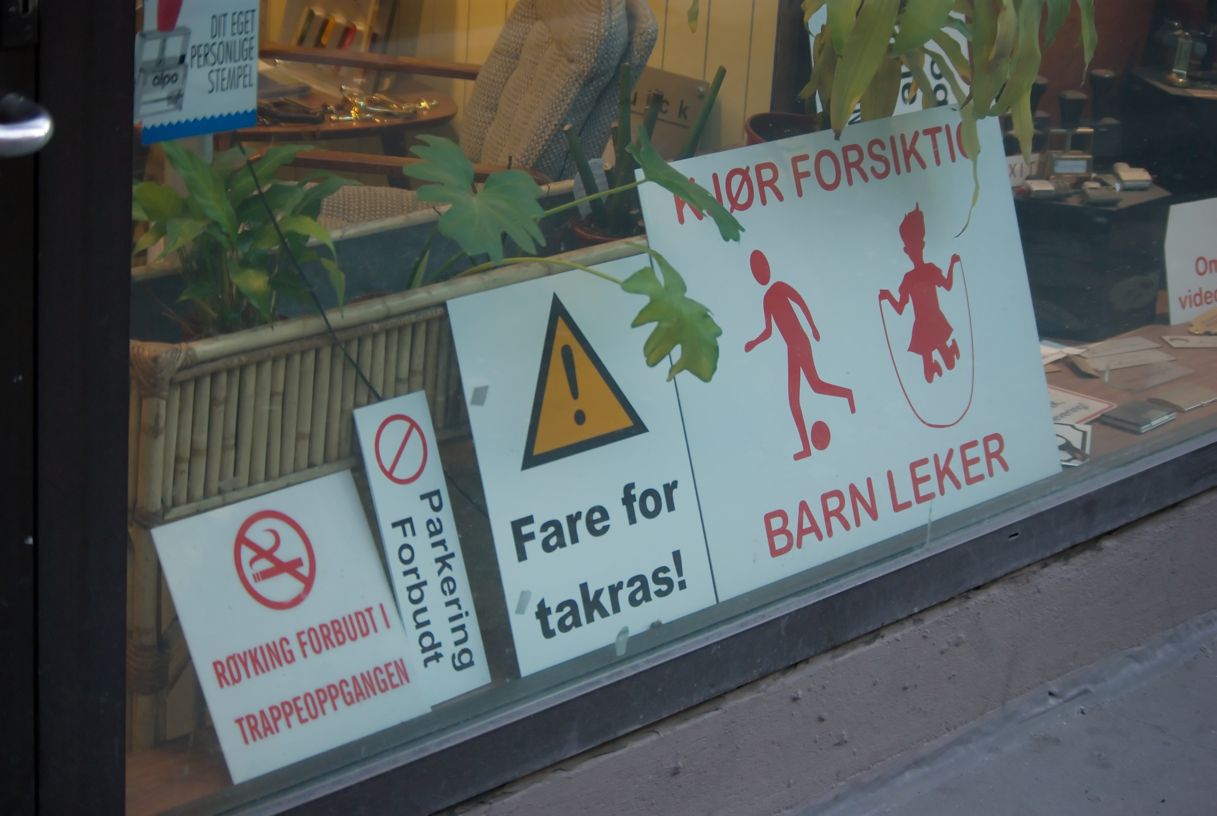 Norwegian warning signs.